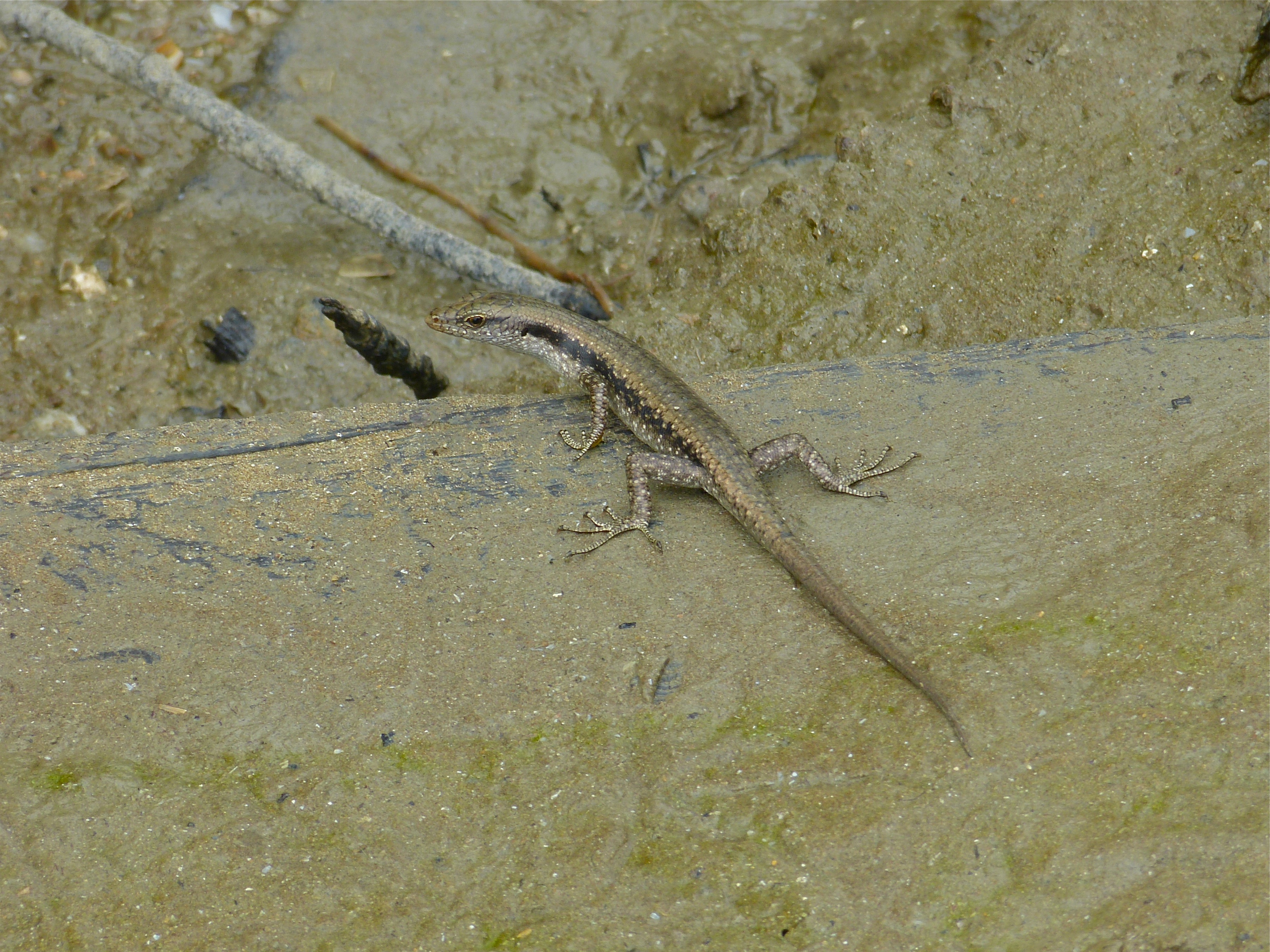 Bako NP, Sarawak, MALAYSIA